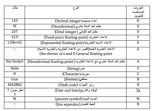 الجدول الاول